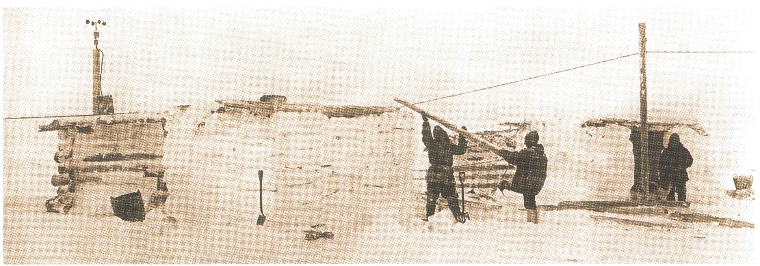 Строительство поварни -- избы для временного проживания.